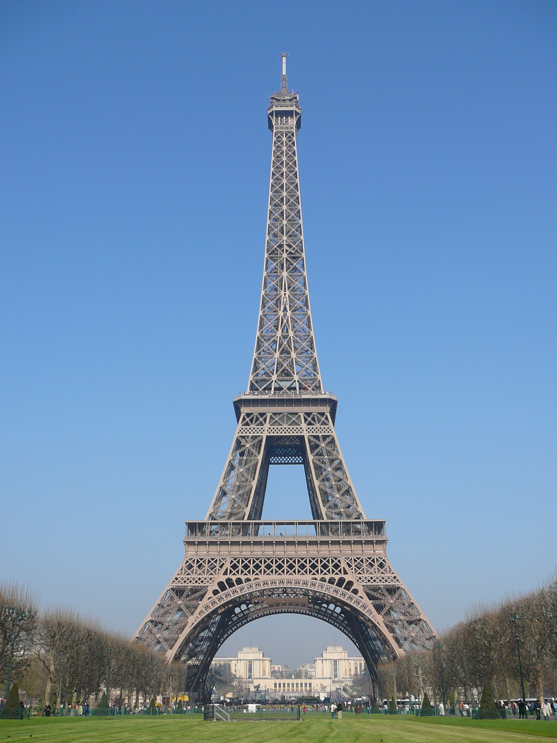 Eiffelturm in Paris